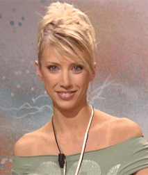 Ginie Van de Noort - Animatrice de télévision